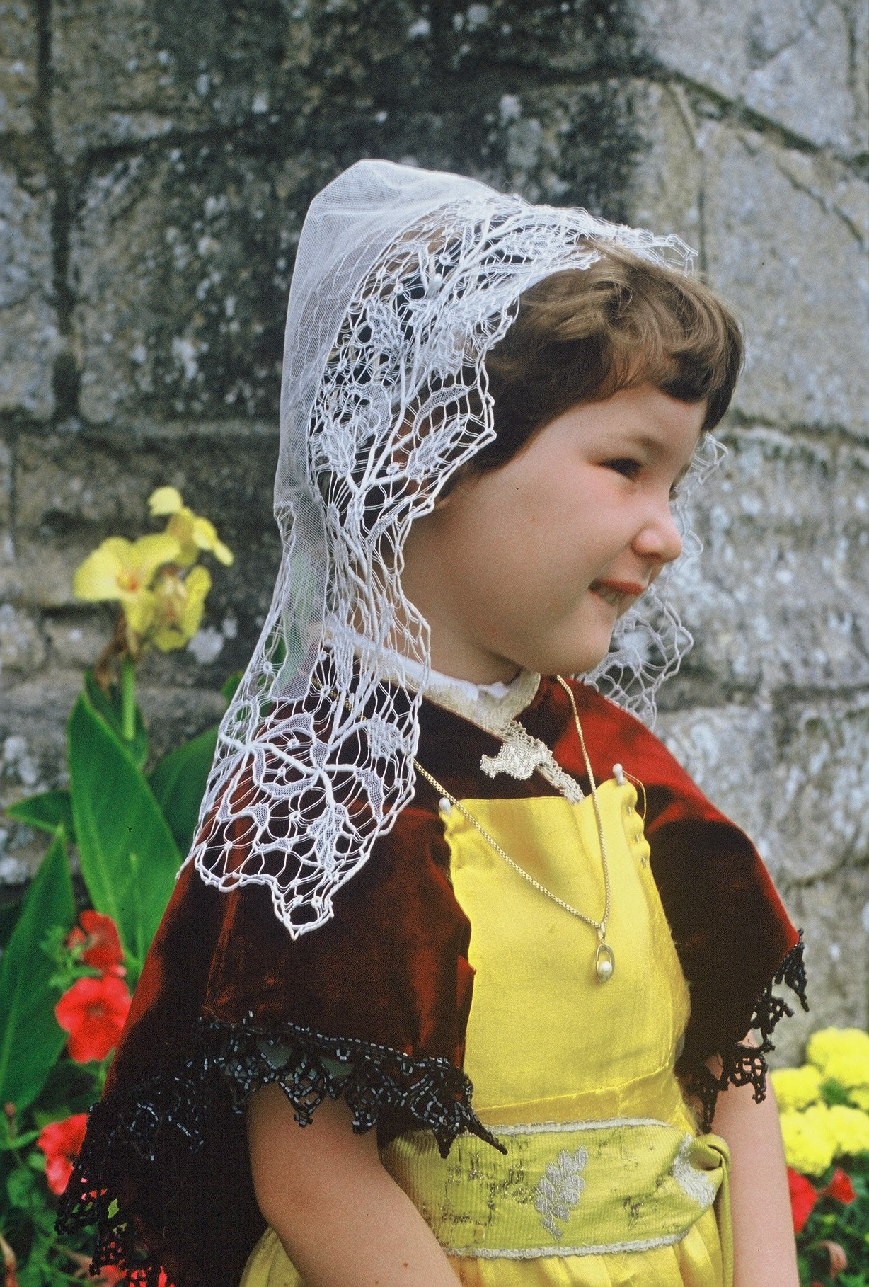 Batz-sur-Mer (Loire-Atlantique, France) - fillette portant une coiffe traditionnelle.